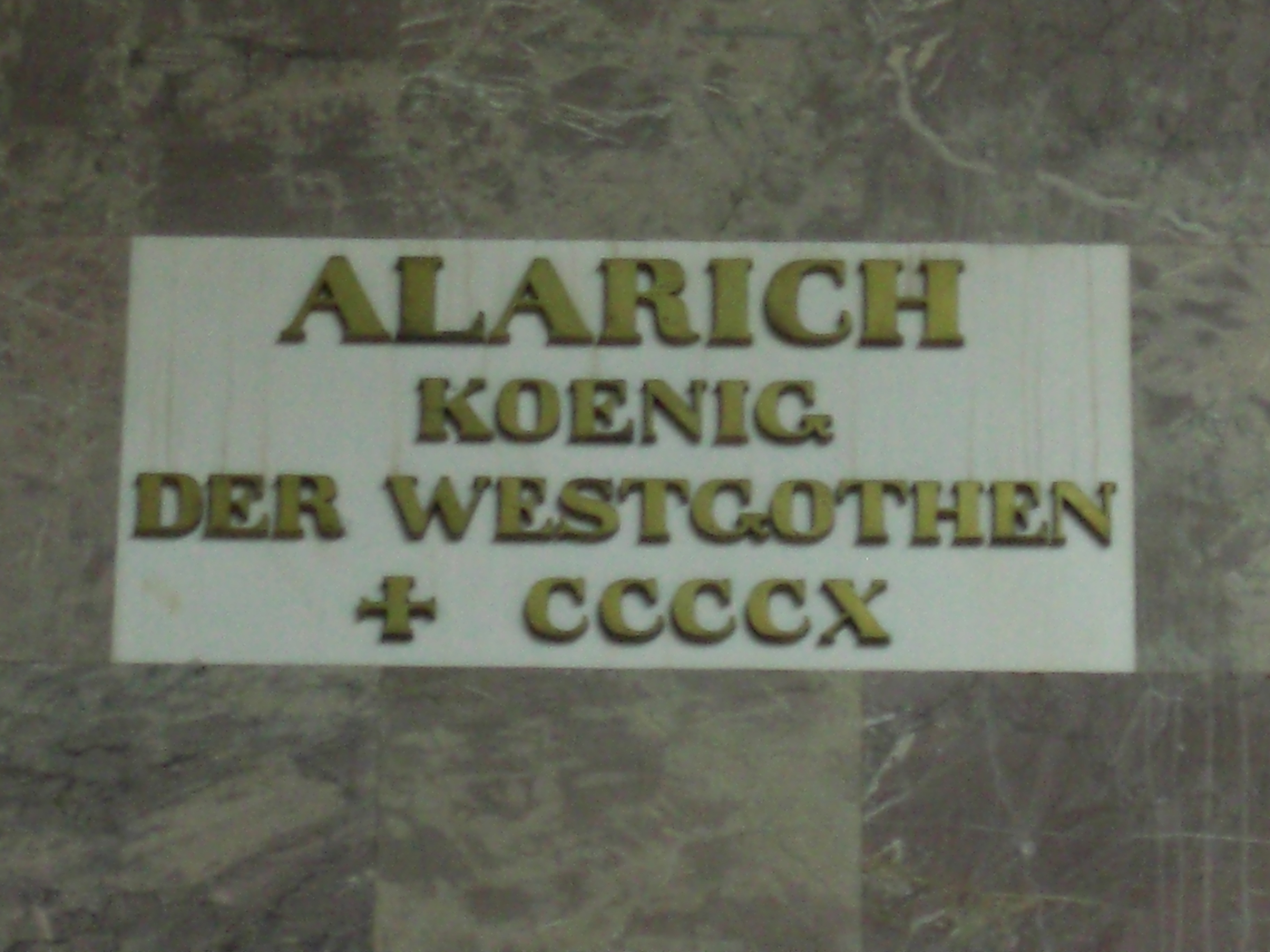 Gedenktafel für Alarich I. (etwa 370-410), König der Westgoten; Walhalla bei Regensburg